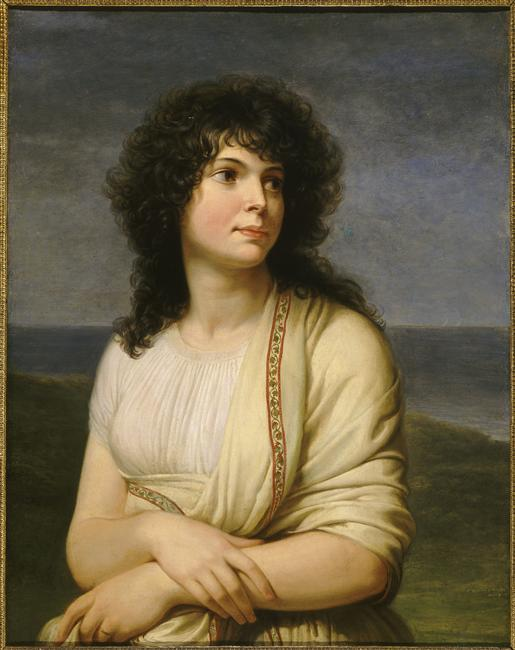 Madame Hamelin, née Jeanne Geneviève Fortunée Lormier-Lagrave (1776-1851). Mariée en 1792 à un fournisseur général aux armées, elle se fit connaître pour sa beauté, son originalité et ses liaisons célèbres, notamment avec Bonaparte. Figure de premier plan dans le petit monde des merveilleuses, elle lança les robes « à la sauvage » et la couleur « cuisse de nymphe émue ».Appiabi, le plus célèbre des peintres néoclassiques italiens, fit son portrait alors qu'elle résidait à Milan, pendant les campagnes de Bonaparte.